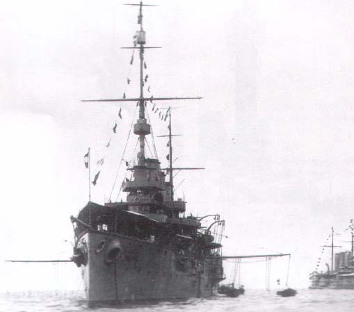 k.u.k. Kreuzer Kaiser Karl VI.